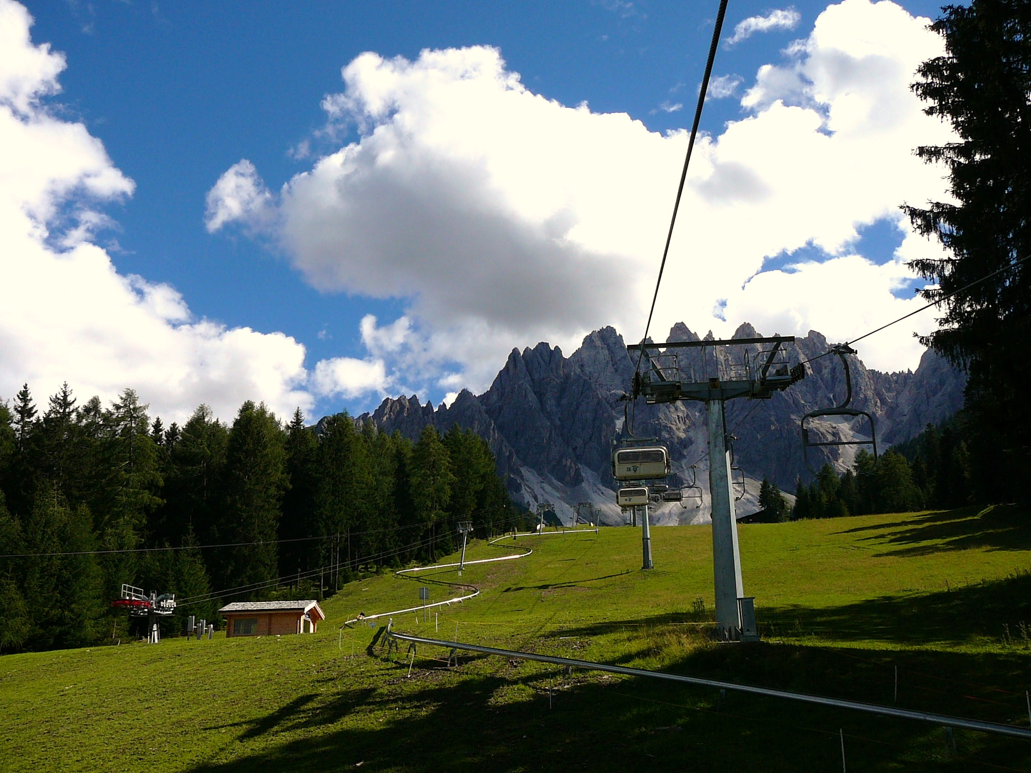 fun bob a san candido